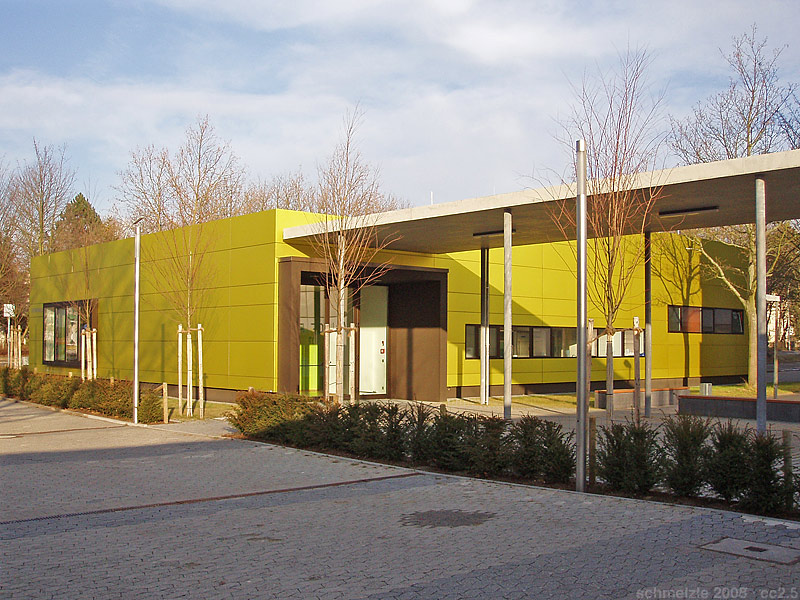 Mensa-Neubau des Elly-Heuss-Knapp-Gymnasiums in Heilbronn-Böckingen